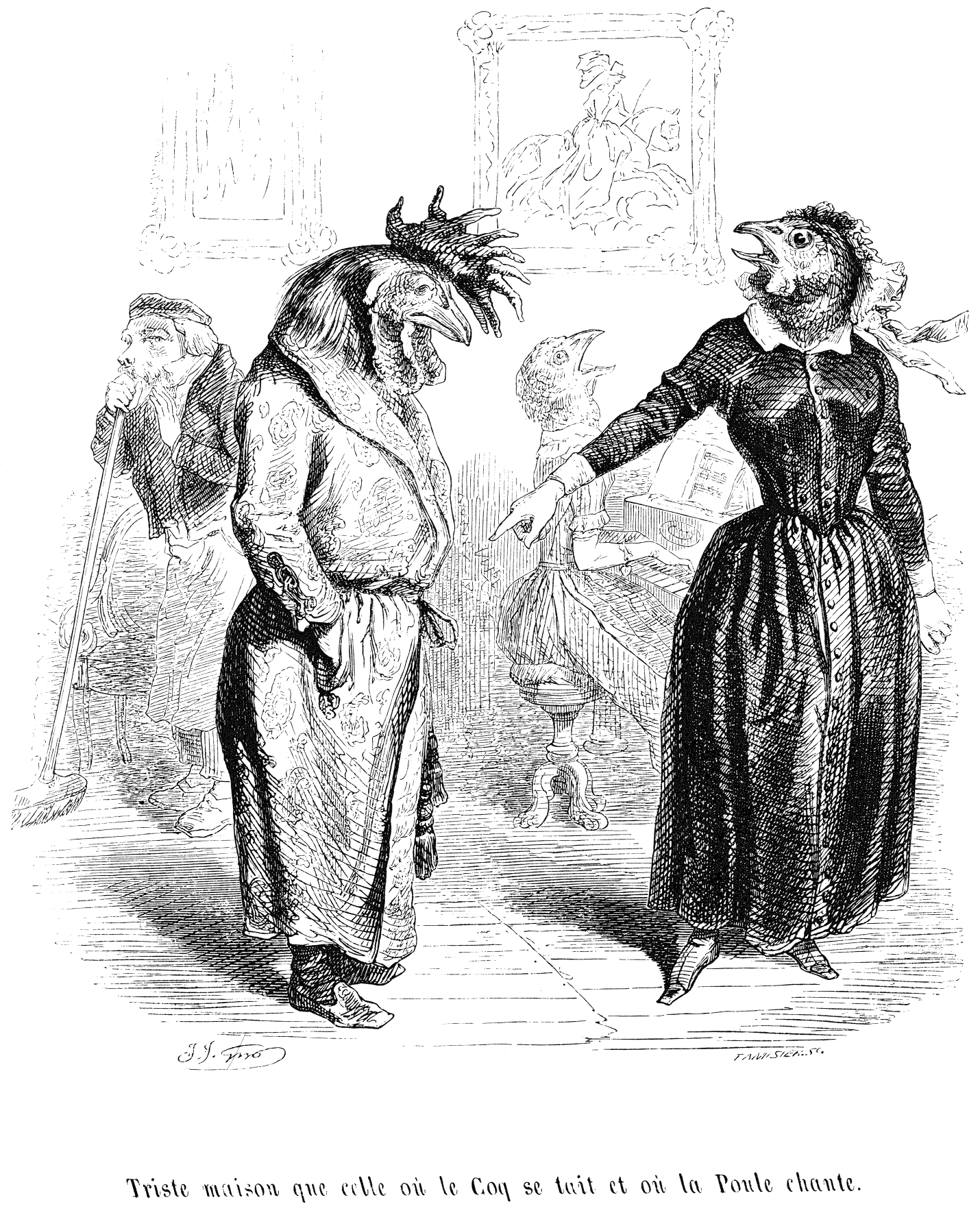 Illustration du proverbe "Triste maison que celle où le Coq se tait et où la Poule chante." Grandville : Cent Proverbes